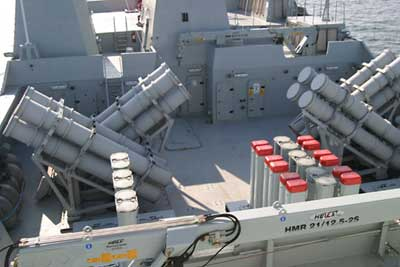 Billedet viser våbenplatformen på støtteskibet HDMS Absalon (L16)